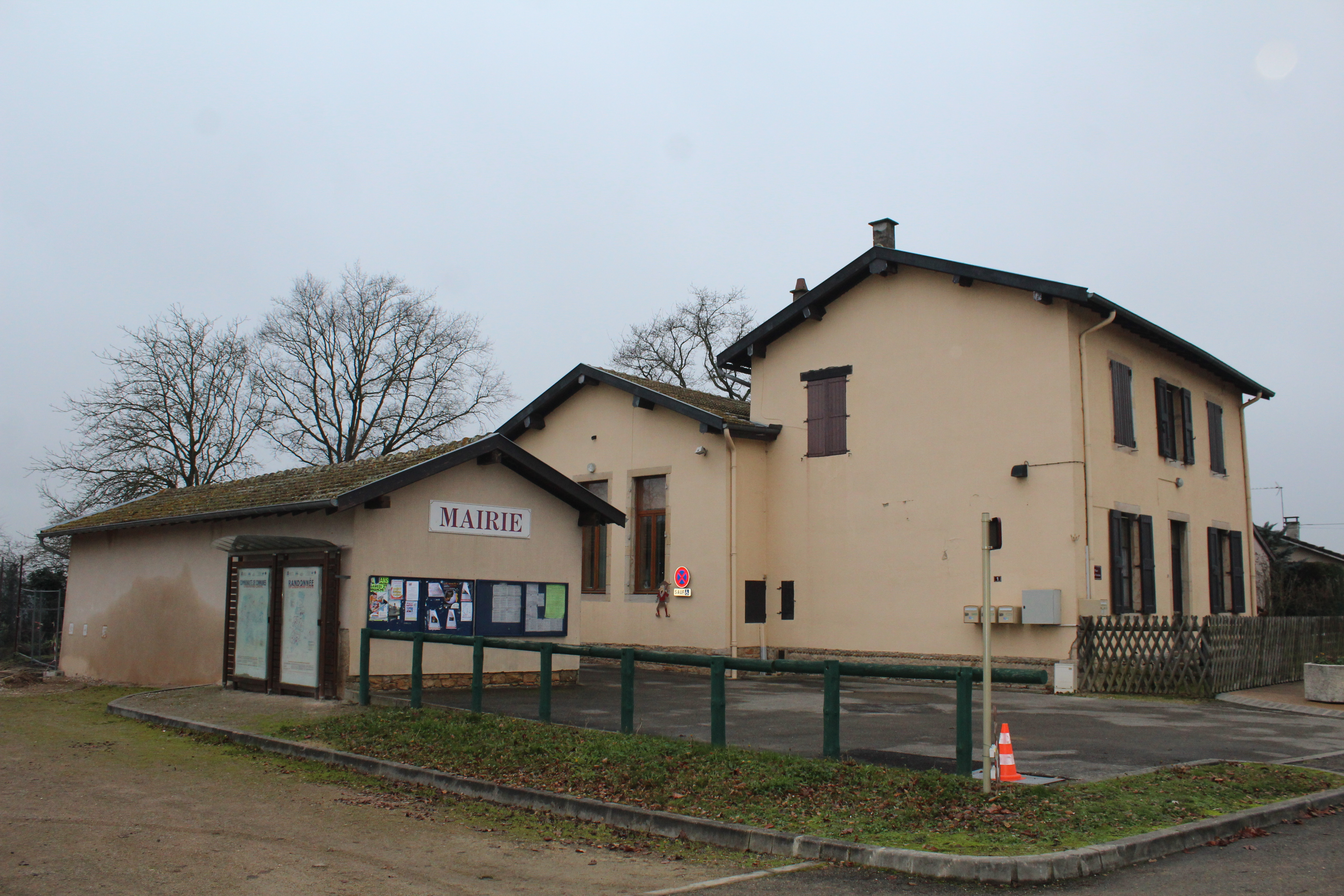 Mairie de Dompierre-sur-Chalaronne.